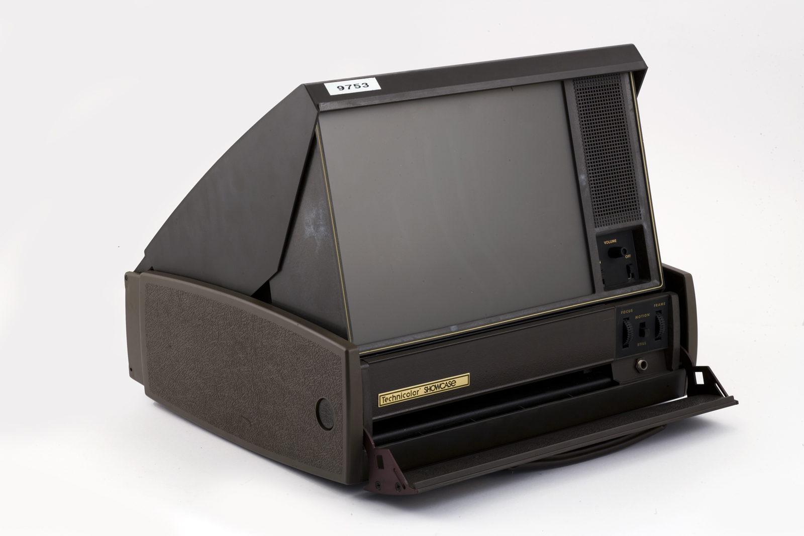 Il proiettore è contenuto in una valigetta in plastica e metallo marroni, con maniglia per il trasporto Agendo su due pulsanti laterali si sblocca un meccanismo interno che permette l'apertura della valigetta e il posizionamento di uno schermo TV, costituito da un foglio in plastica opaco, in posizione verticale. Appoggiando il coperchio sulla cornice dello schermo questo si mantiene in posizione Accanto allo schermo, protetto da una griglia in plastica, è inserito un altoparlante e, sotto, si trovano due interruttori per l'accensione e lo spegnimento e un potenziometro per la regolazione del volume Sotto allo schermo si ha il vano per l'inserimento della cassetta, protetto da uno sportello, una rotella per la messa fuoco dell'immagine e una per la centratura del fotogramma e un selettore per pausa/avvio All'interno del proiettore si trovano il dispositivo illuminante e di proiezione. Il fascio viene proiettato su uno specchio trapezoidale posto all'interno del coperchio che riflette l'immagine sul retro dello schermo. All'interno del coperchio è fissato anche un pennello per la pulizia dell'apparecchio. Funzione Proiettore sonoro da utilizzare con apposite cassette Technicolor (formato pellicola: Super8).